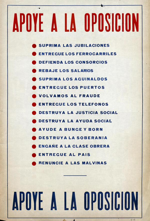 Publicidad del Partido Justicialista (de Perón) hacia las elecciones argentinas de 1951 con el lema "Apoye a la Oposición".